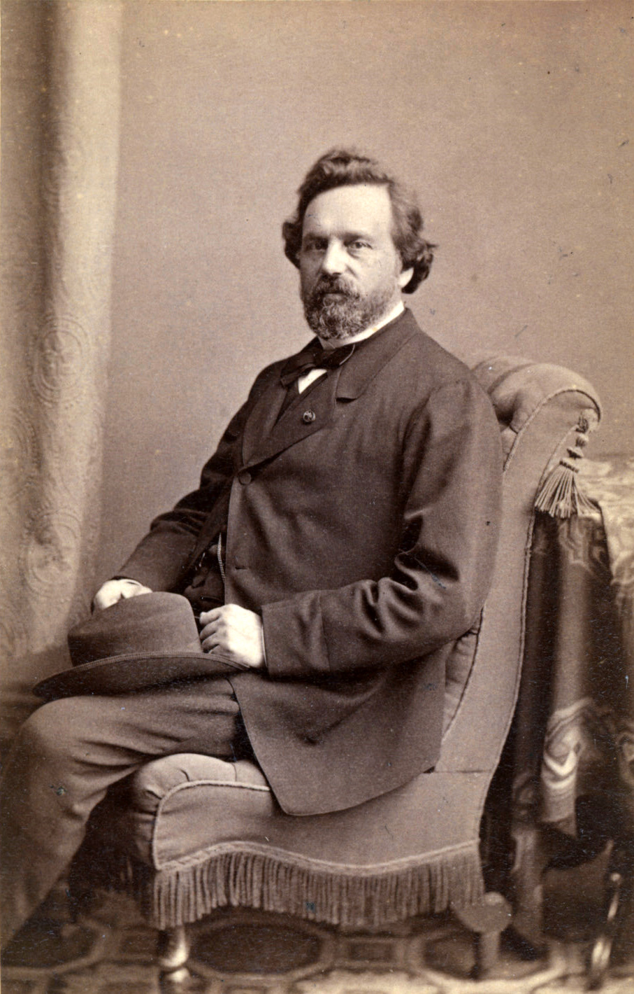 Donders, Franciscus Cornelis (1818 - 1889)